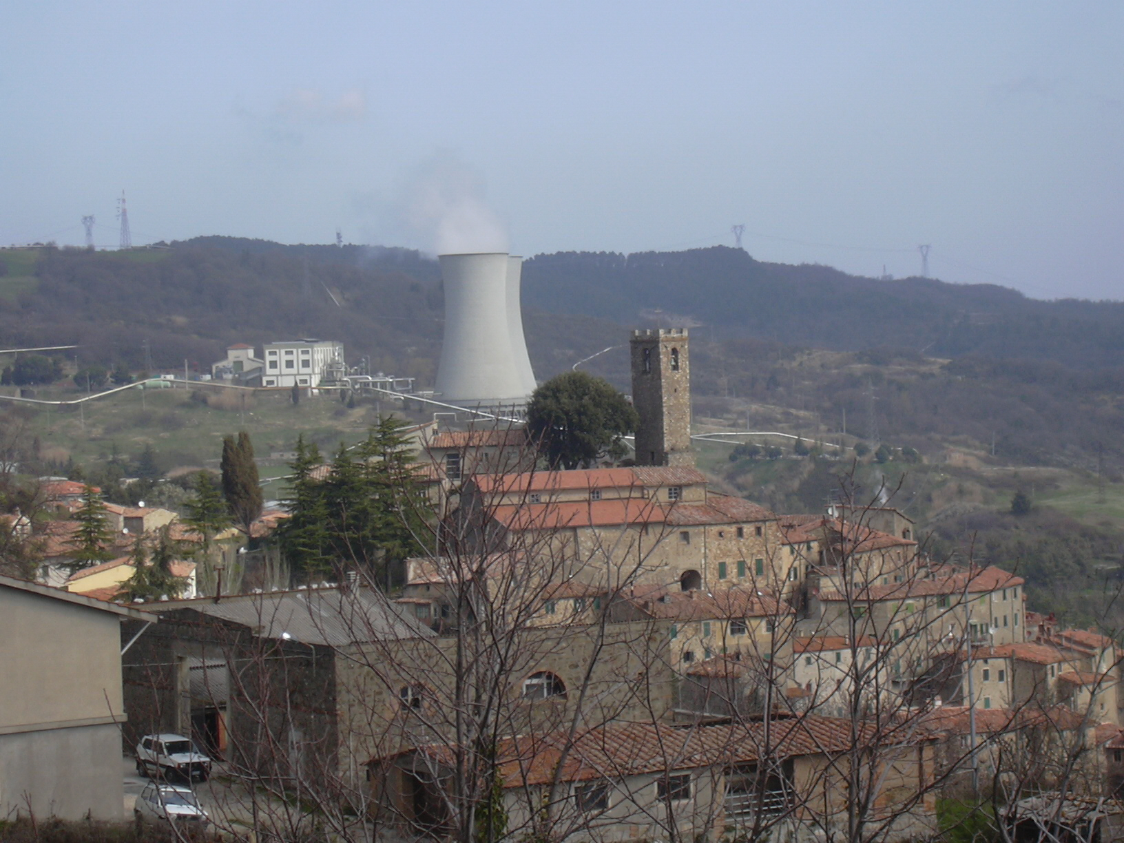 Castelnuovo di Val di Cecina, Tuscany/Italy: Medieval village and ENEL facilities